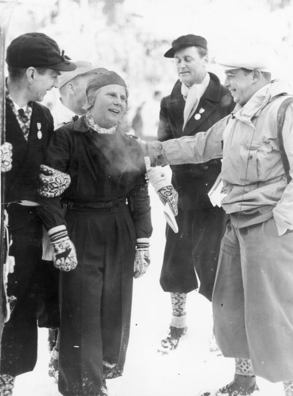 Schou-Nilsen Norwegen Siegerin im Damen Abfahrtslauf